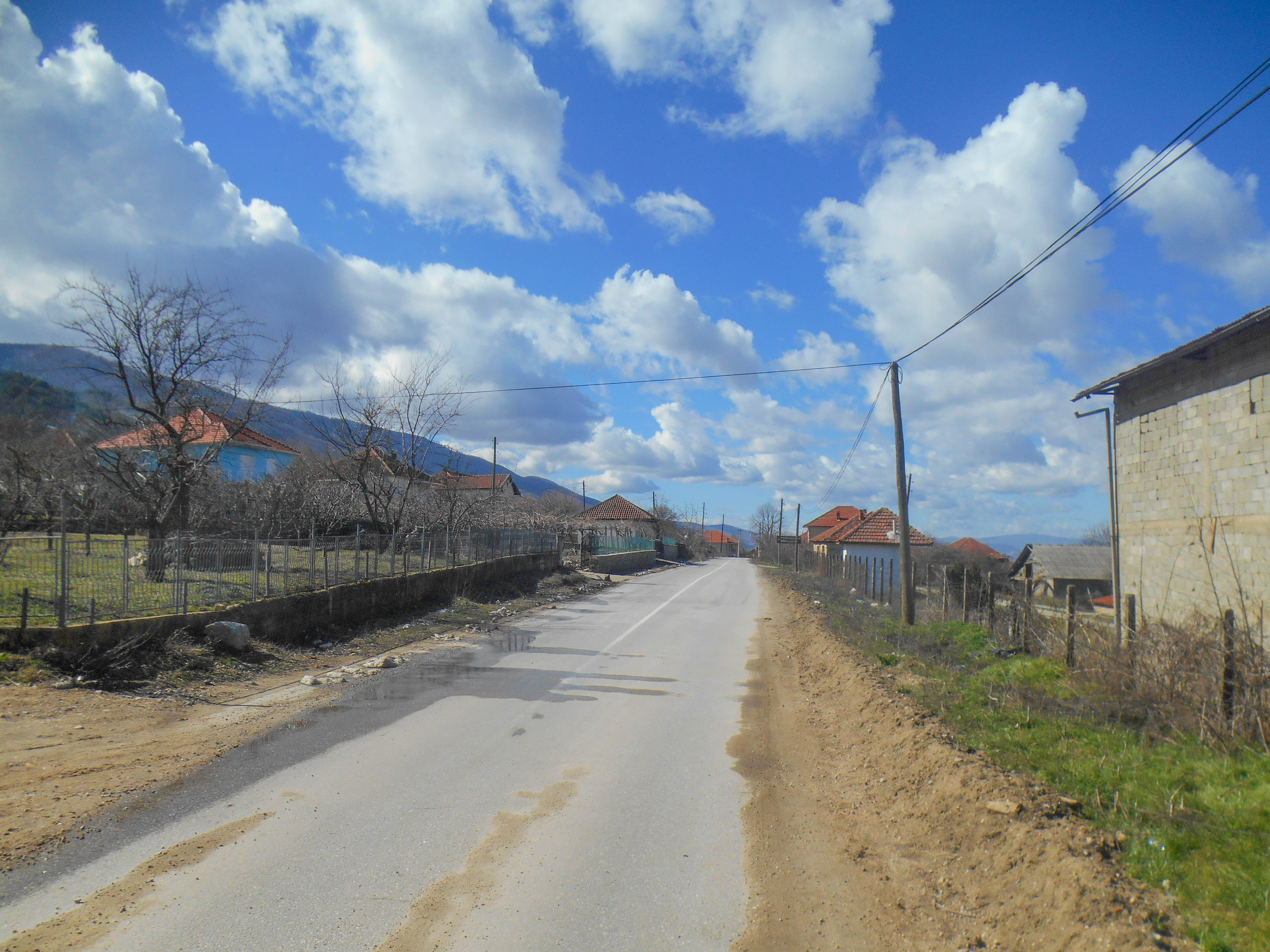 Борисово, Општина Ново Село